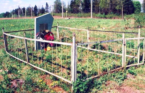 Старый памятник на месте убийства евреев деревни Коханово Толочинского района во время Холокоста в январе 1942 года. Находится на еврейском кладбище Коханово, примерно в 300 метрах от улицы Минской, недалеко от железной дороги. Установлен в 1994 году.